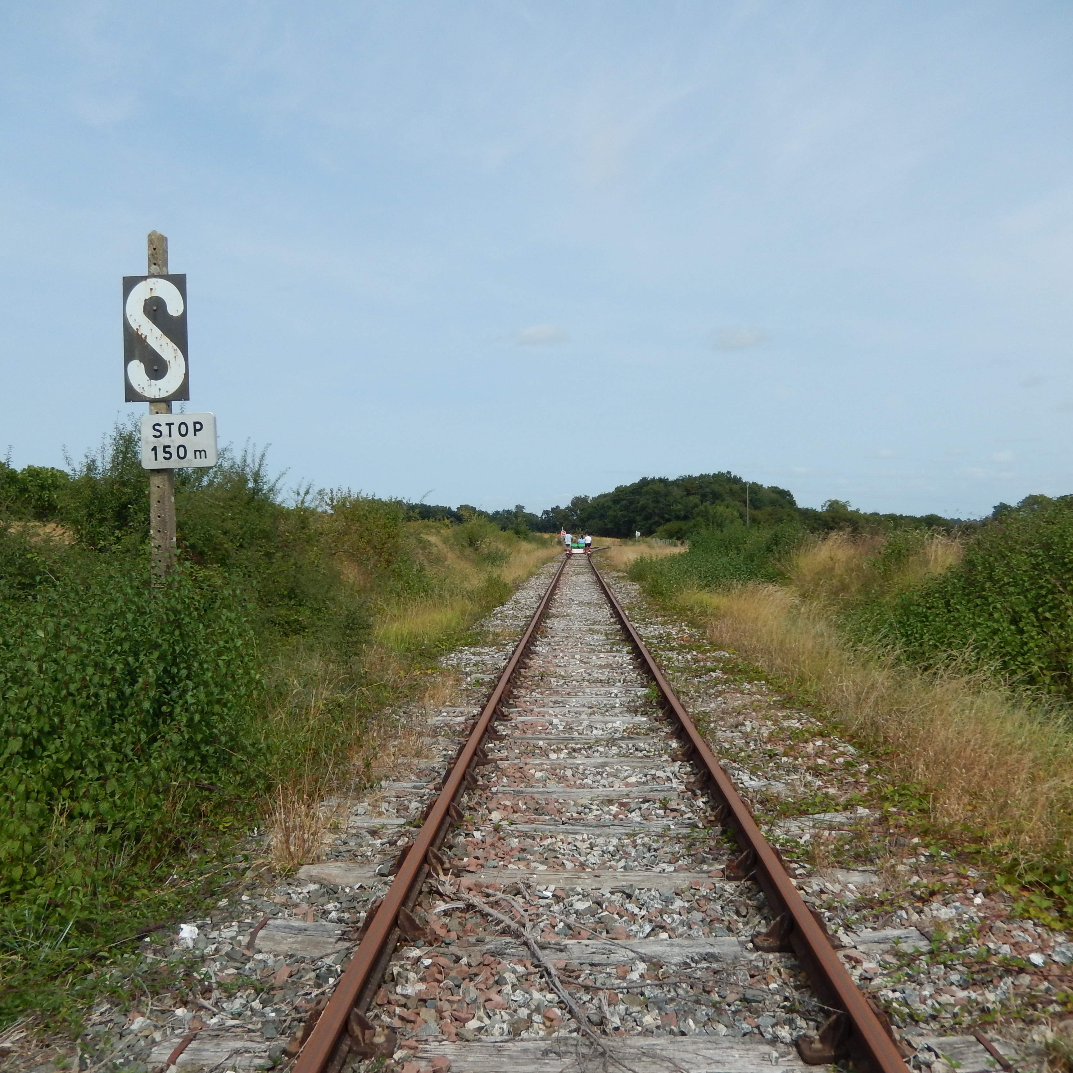 La ligne ferroviaire de Pons à Saujon est aujourd'hui exploitée, entre Cozes et Saint-André-de-Lidon, pour des trajets touristiques en vélo-rail.